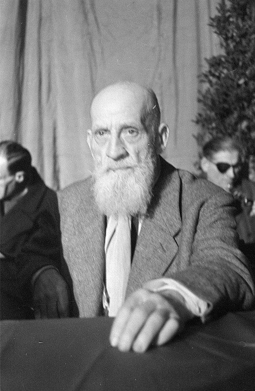 Original image description from the Deutsche FotothekPorträt: Ernst Eugen Ernst auf dem Parteitag zur Vereinigung von SPD und KPD